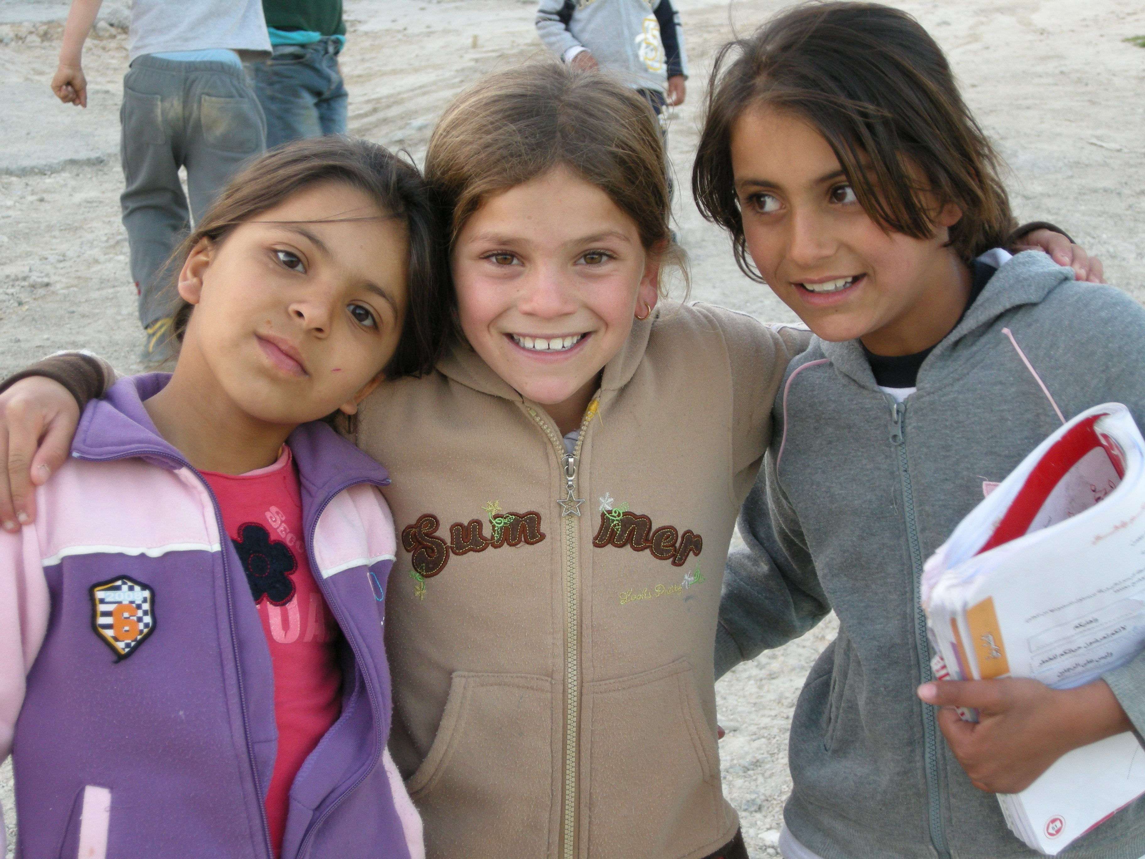 Photos from Drijat